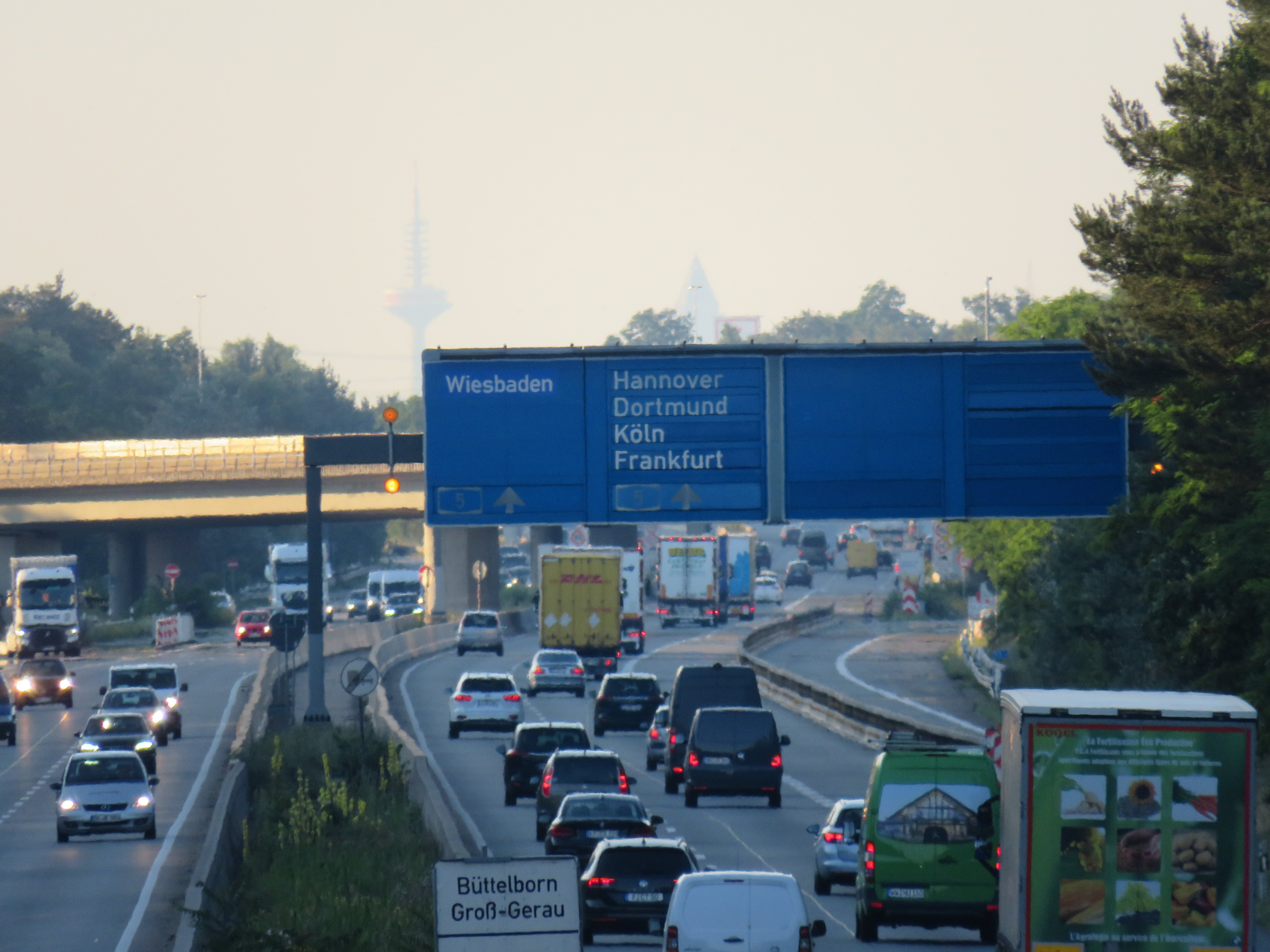 Älterer Wechselwegweiser (Prismenwender) an der BAB 67 südlich vom Darmstädter Kreuz. Da wegen Sanierungsarbeiten die Rampe von Mannheim her kommend in Richtung Köln/Wiesbaden gesperrt ist, wird eine Umleitung ausgeschildert - zum einen mit Zusatzschildern am Fahrbahnrand, zum anderen mit veränderbaren Schriftzügen im Wegweiser selbst. Zusätzlich blinken Lampen links und rechts neben dem Wegweiser. Aus nördlicher Richtung stehen am selben Knotenpunkt moderne LED-Tafeln (dWiSta). Im Hintergrund ist der Europaturm und der Messeturm in Frankfurt am Main zu erkennen.